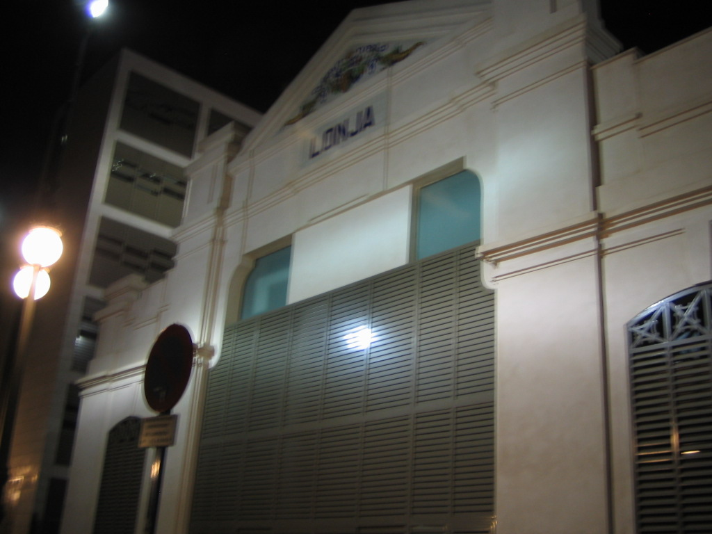 Antigua lonja de Orihuela, actual autitorio.